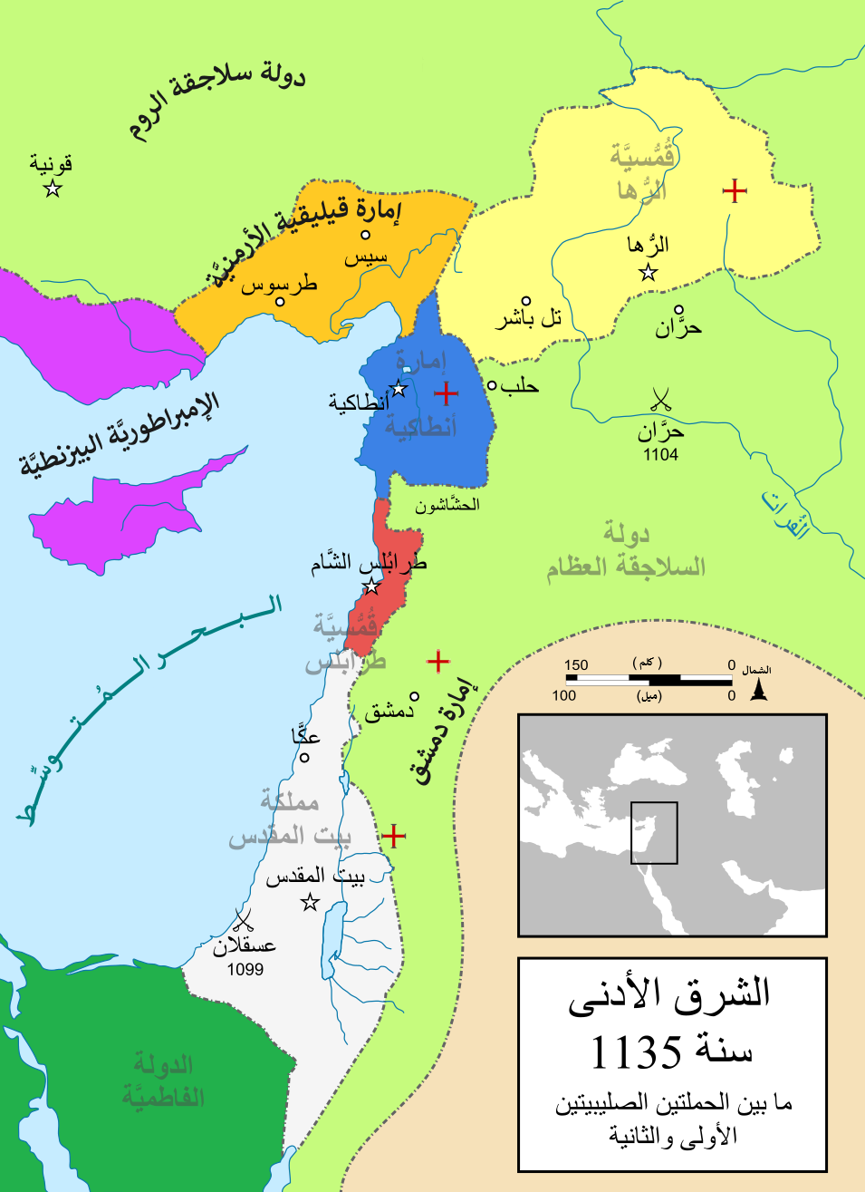 الدويلات الصليبية والدول الإسلامية المجاورة لها في الفترة بين الحملتين الصليبيتين الأولى والثانية.